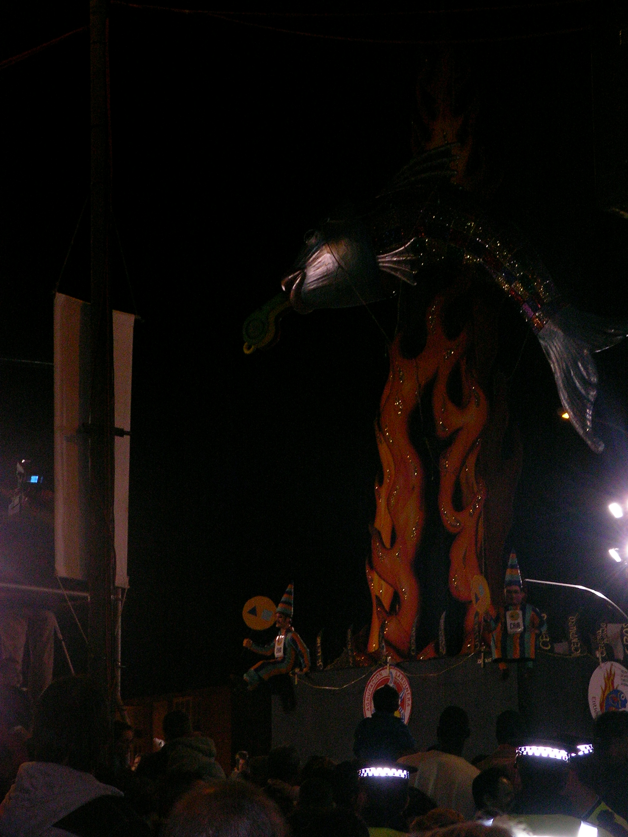 Entierro de la sardina 2008